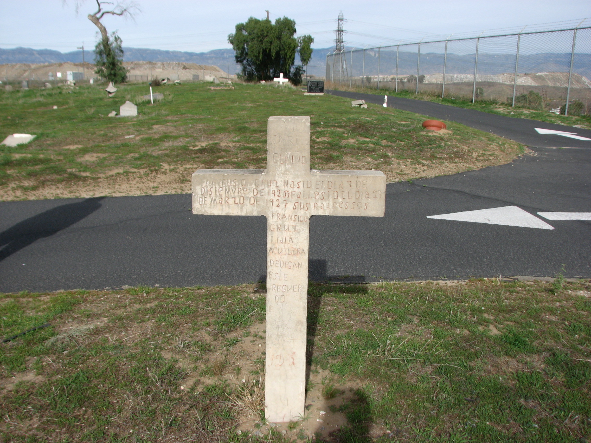 varied 869